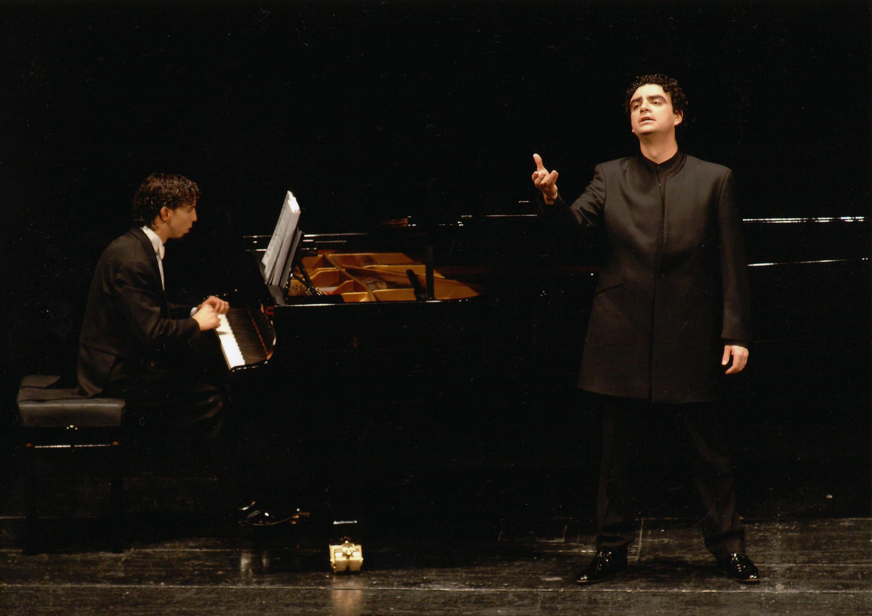 Ángel Rodríguez acompañando al piano al tenor mexicano Rolando Villazón en un recital en el Teatro Real de Madrid.